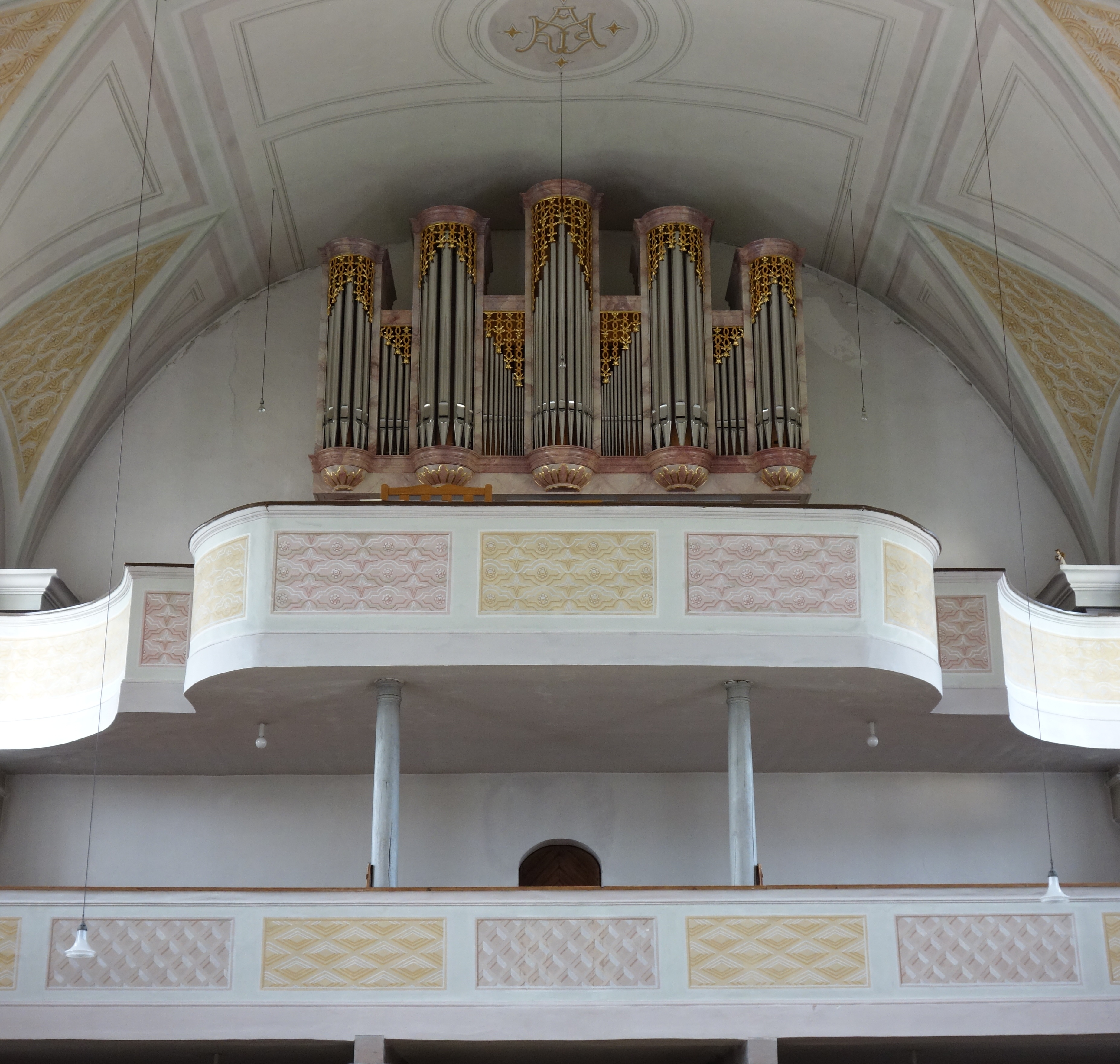 Orgel der Pfarrkirche Mariä Geburt in Wartenberg (1988, Anton Staller, II/27)